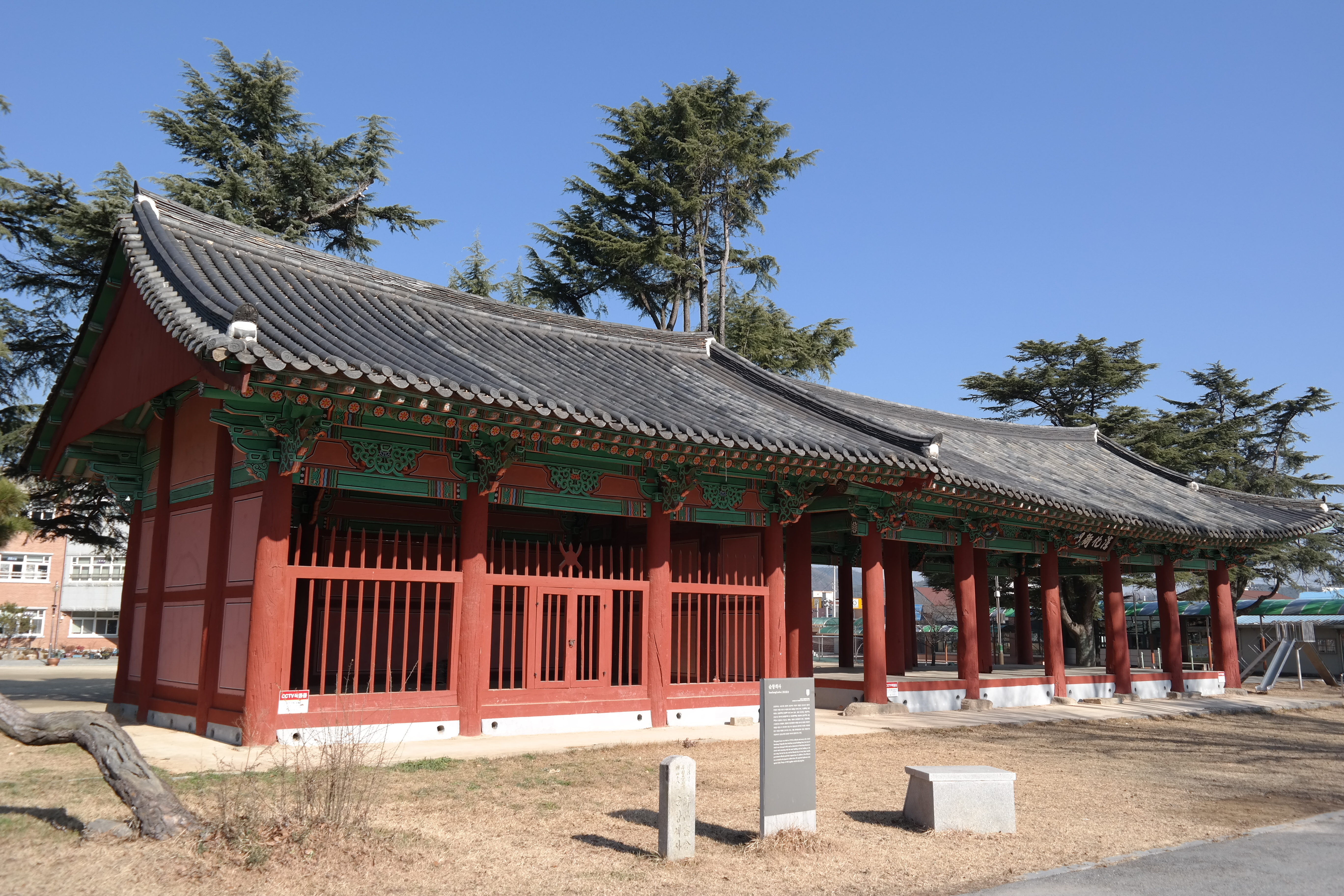 전라북도 유형문화재 제48호 순창객사(淳昌客舍).